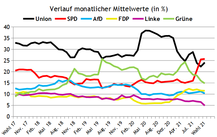 Verlauf der Mittelwerte, Stand 9. Oktober 2017